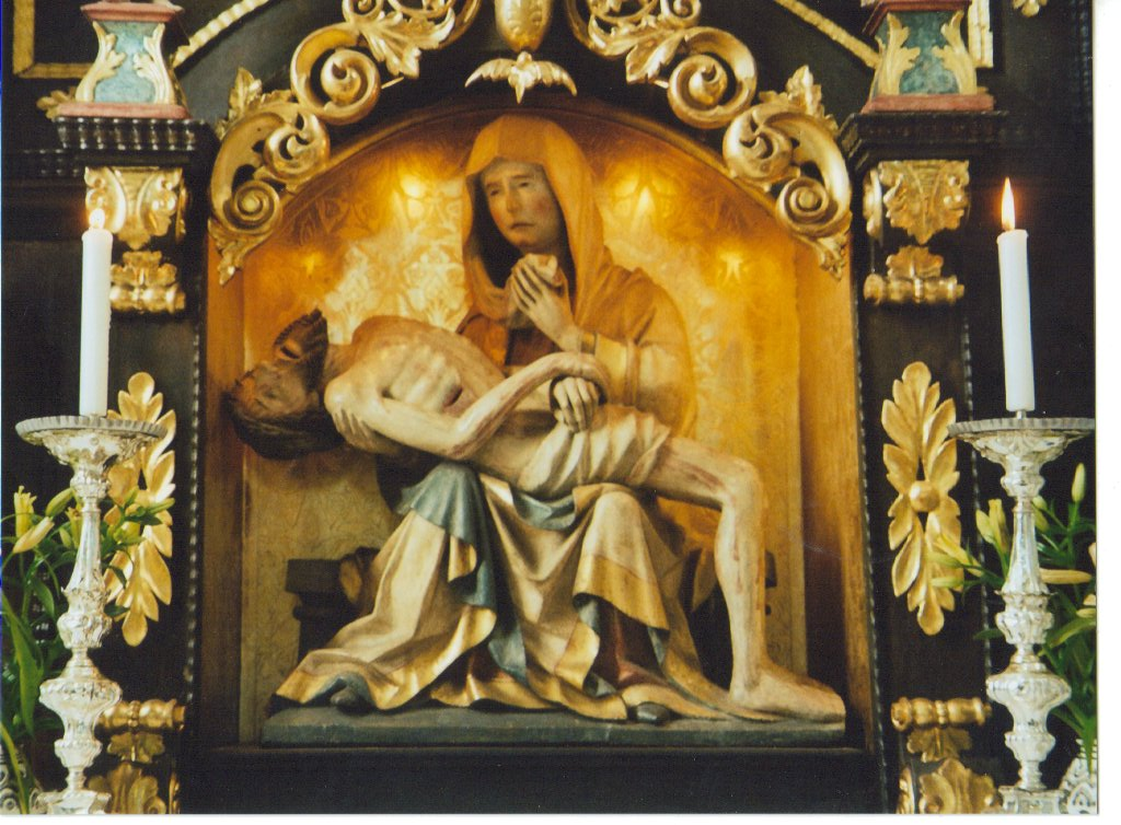 Pieta in Fischen - Wallfahrtplastik